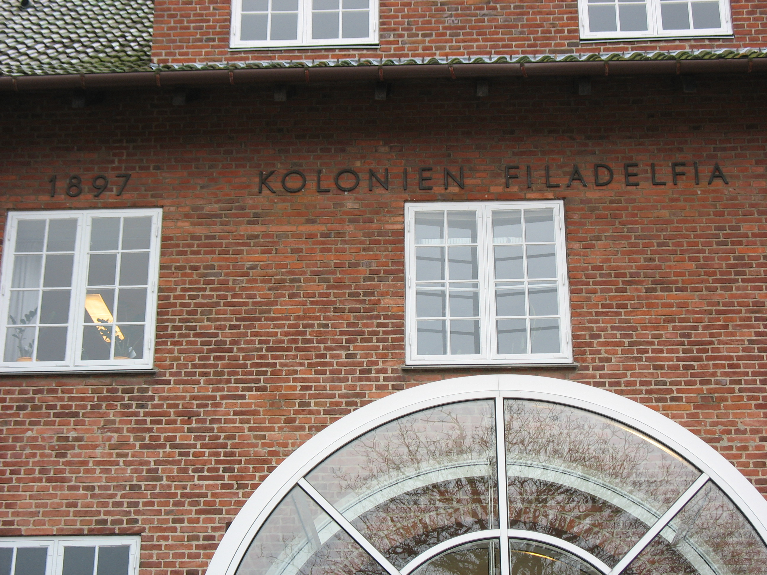 Kolonien Filadelfia - 1897